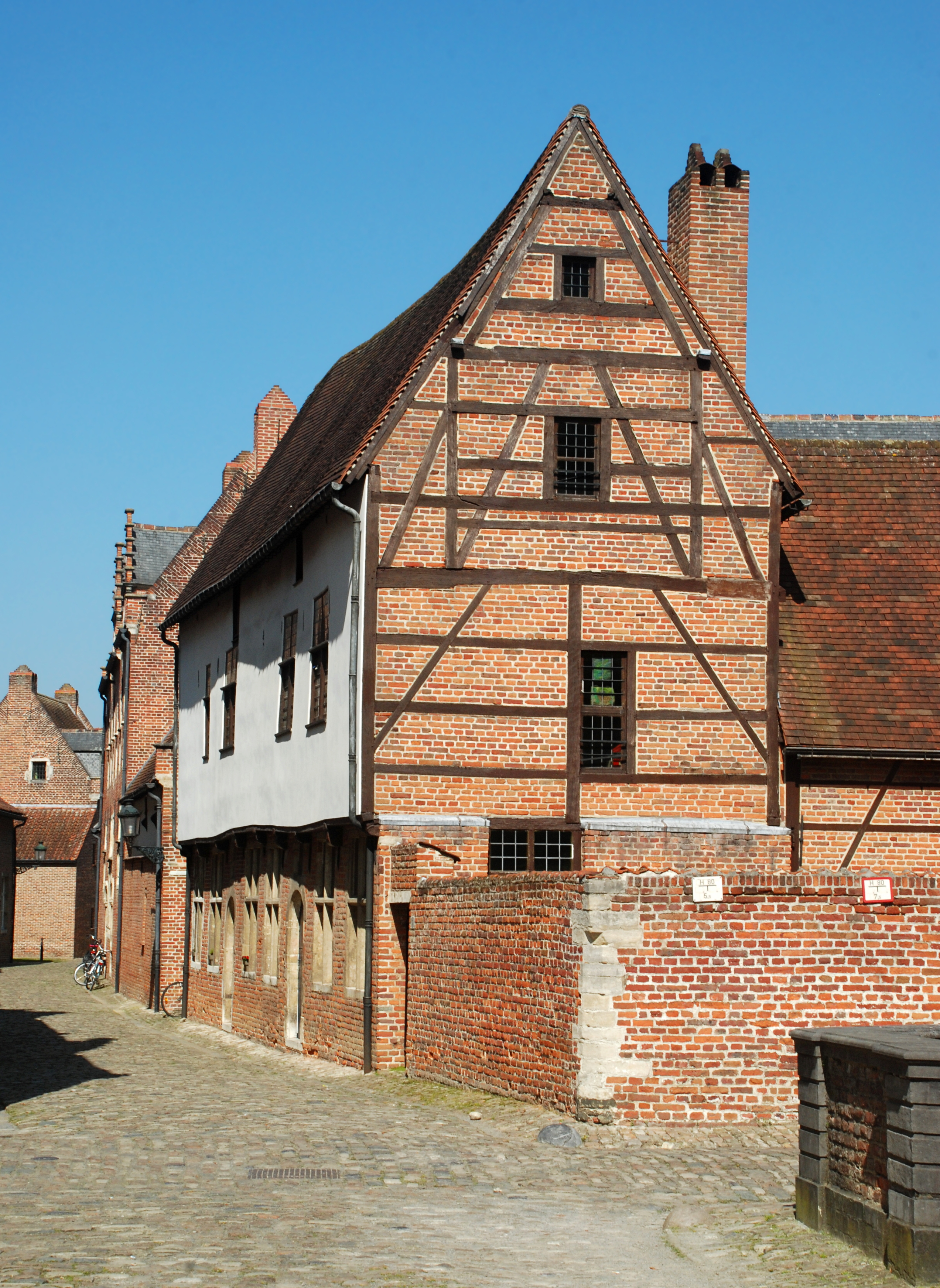 Belgium - Leuven - Groot Begijnhof - n° 72 (Middenstraat) - maison à colombages